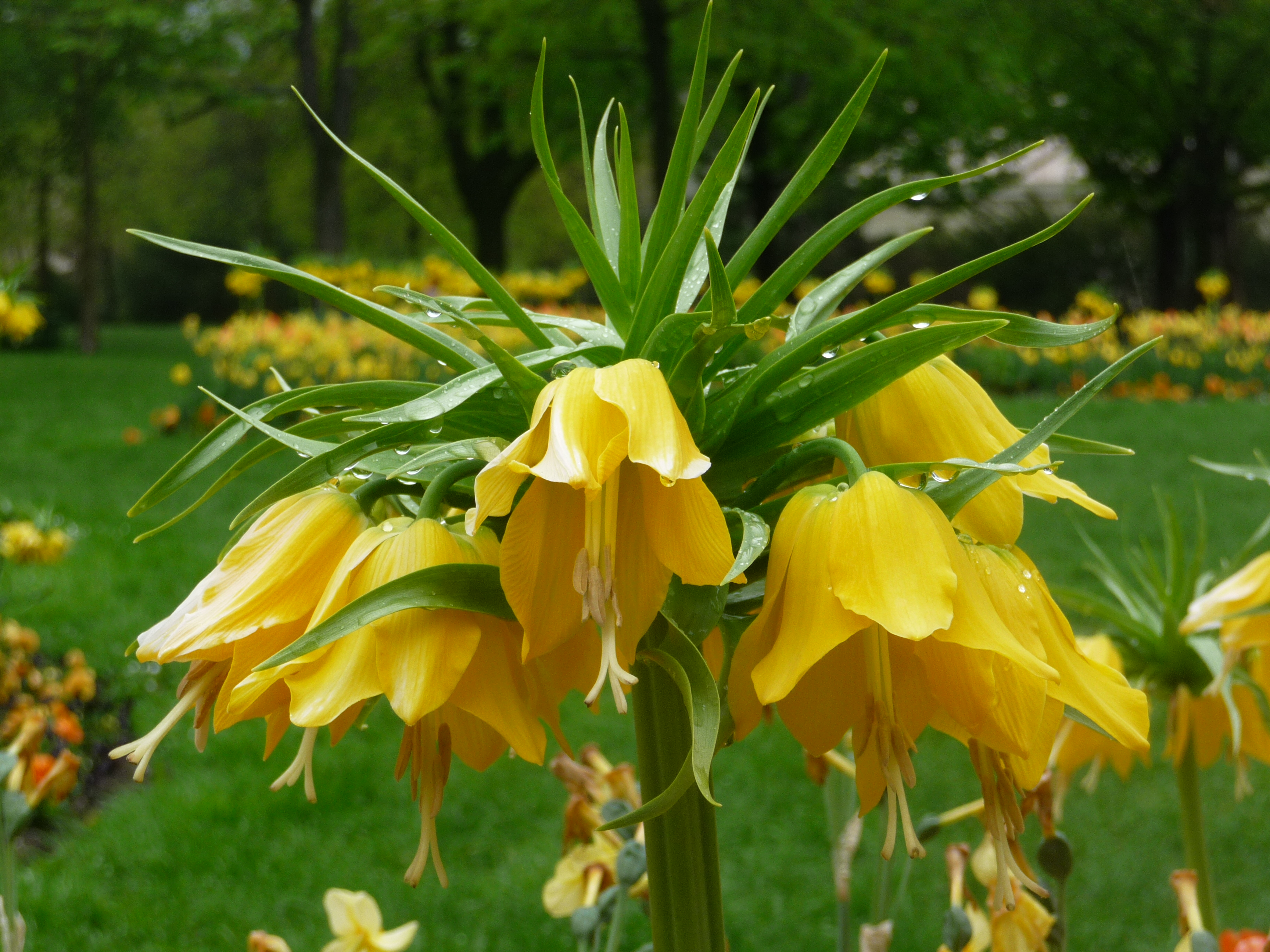 Inflorescence de fritillaire impériale (couronne impériale), variété lutea photographiée au parc des Bastions (Genève) le 15 avril 2012